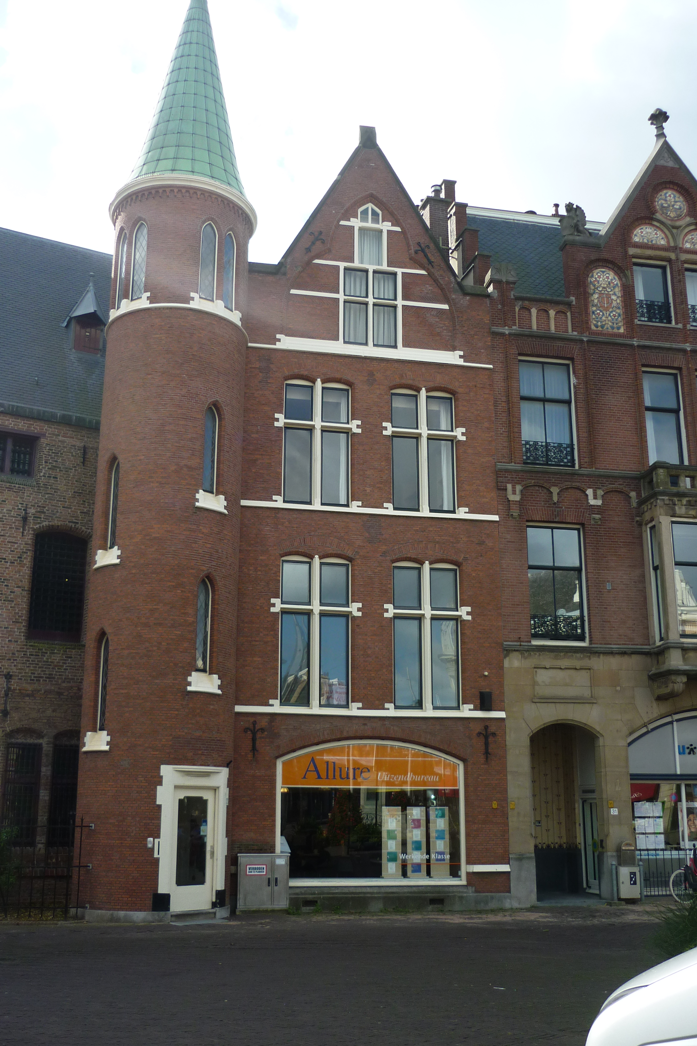 Torentje op De Plaats in Den Haag, naast de Gevangenpoort, bouwjaar 1874